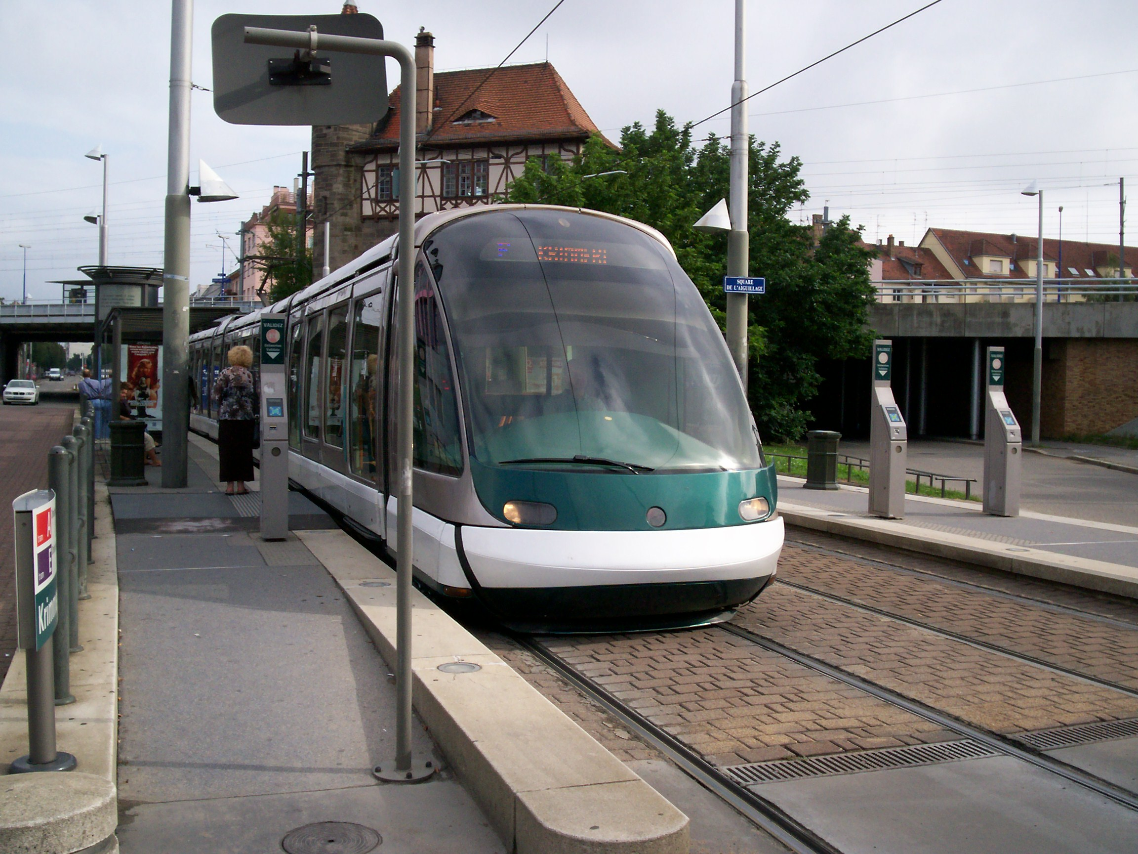 Tramway de Strasbourg line E au Terminus Krimmeri Stade de la Meinau